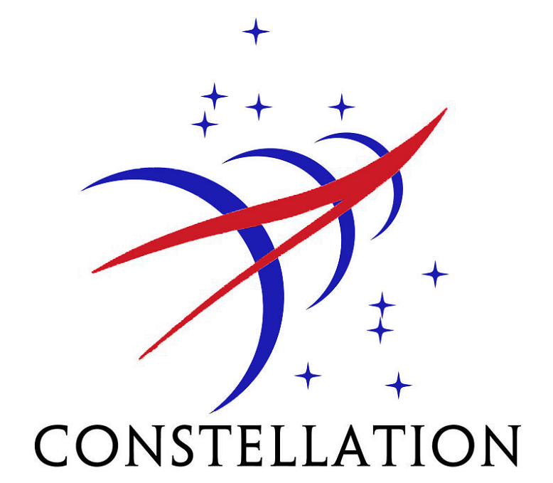 NASA